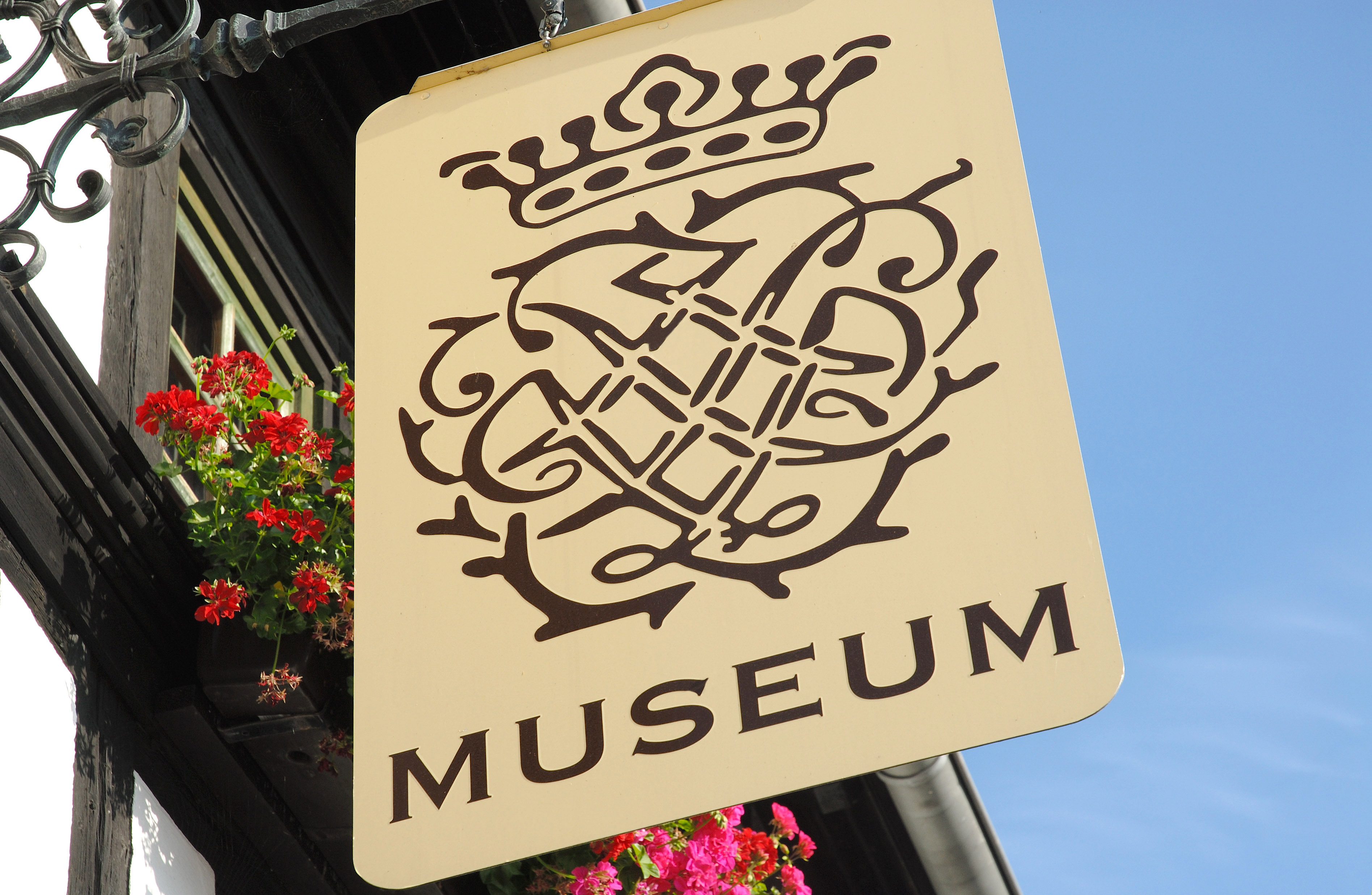 Schild am Bach Museum